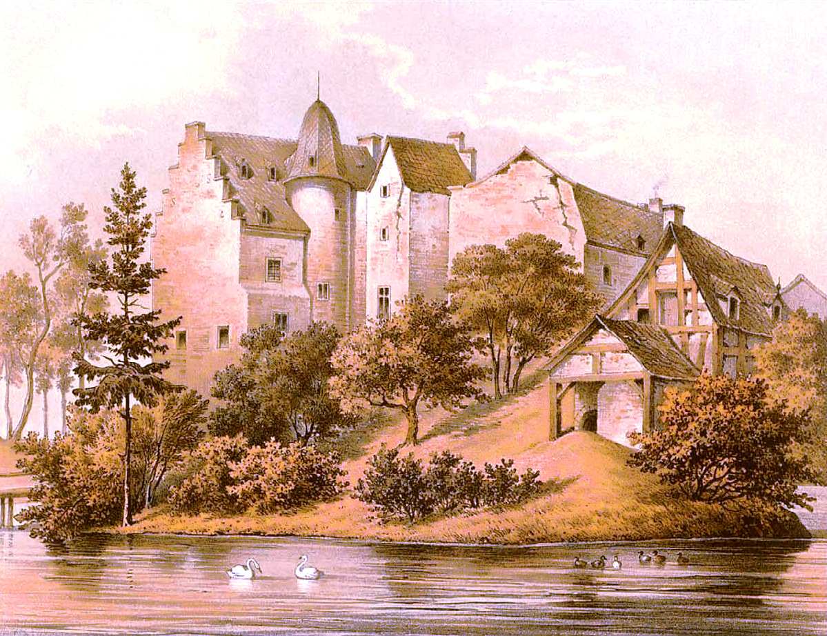 Burg Bodenheim, Kreis Euskirchen, Rhein-Provinz